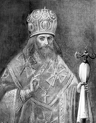 Варлаам (Вонатович), архиеп. Киевский. Портрет. XVIII в. (РГИА)